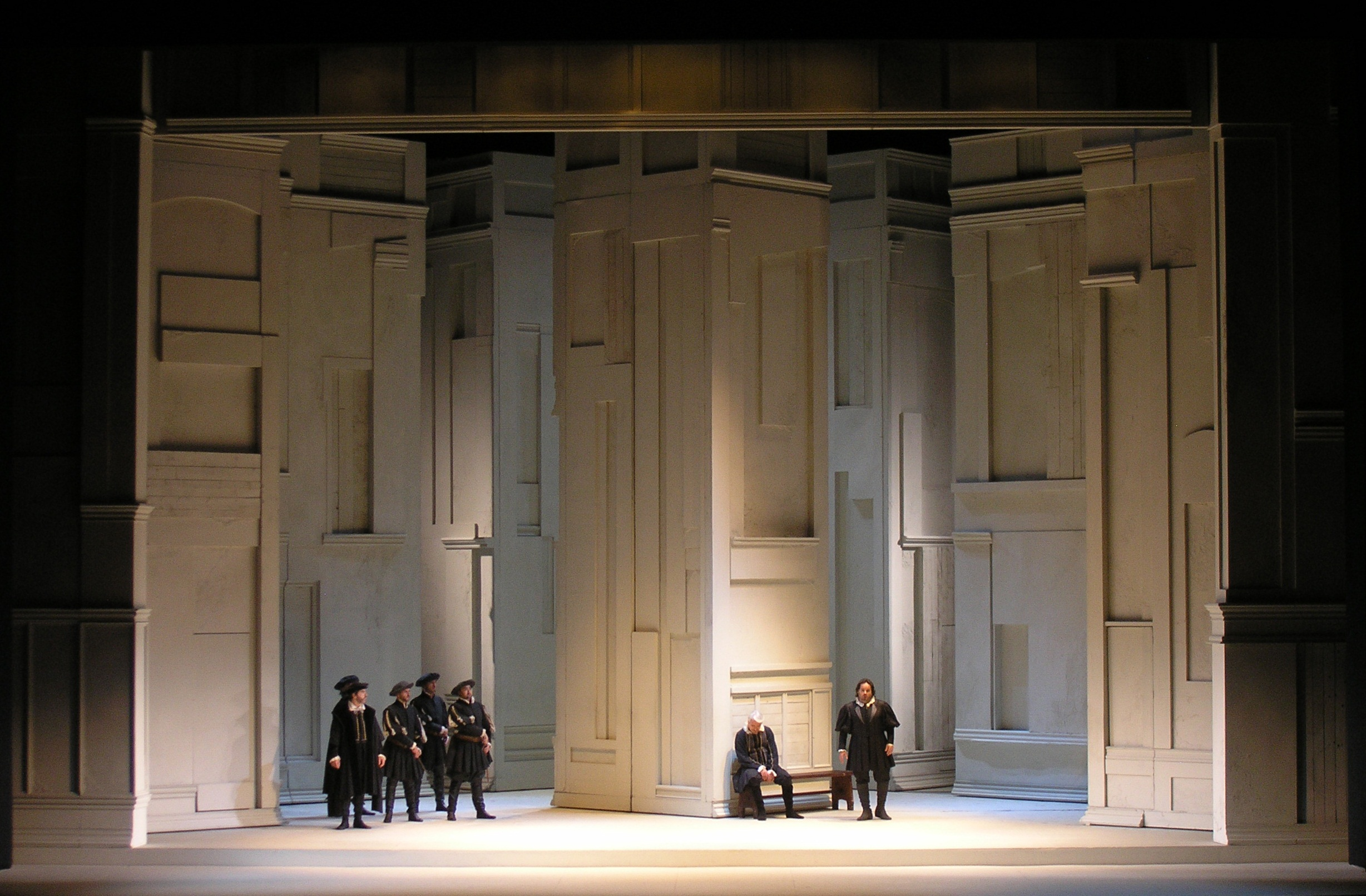 אנה בולנה, במאי ג'ונתן מילר, מעצב תפאורה: רוני תורן, מעצבת תלבושות קלייר מיטשל, מעצב תאורה רוברט בריאן, אופרה בילבאו, ספרד 2007